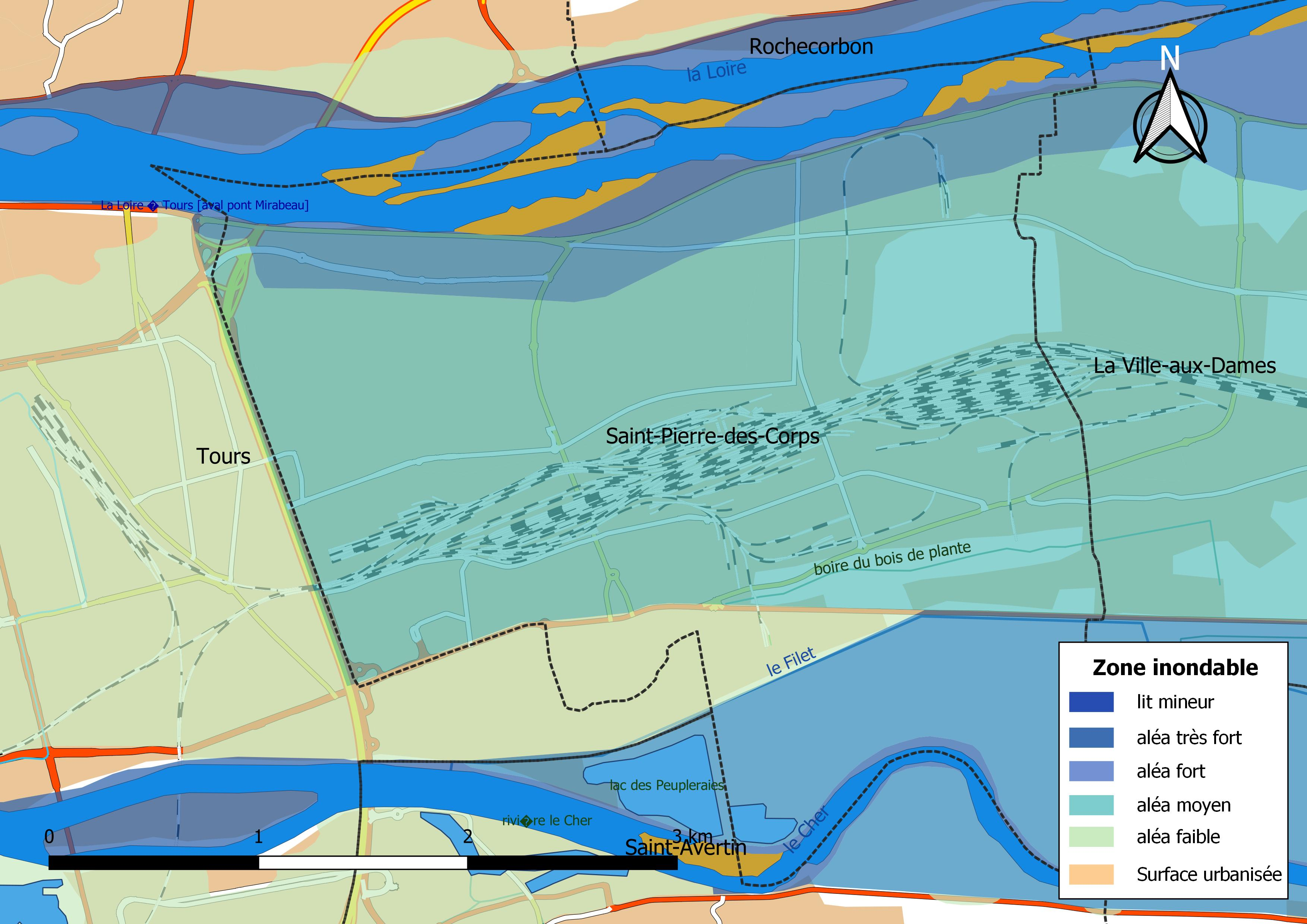 Zone inondable et réseaux hydrographique et routier de la commune de Saint-Pierre-des-Corps (Indre-et-Loire, France).